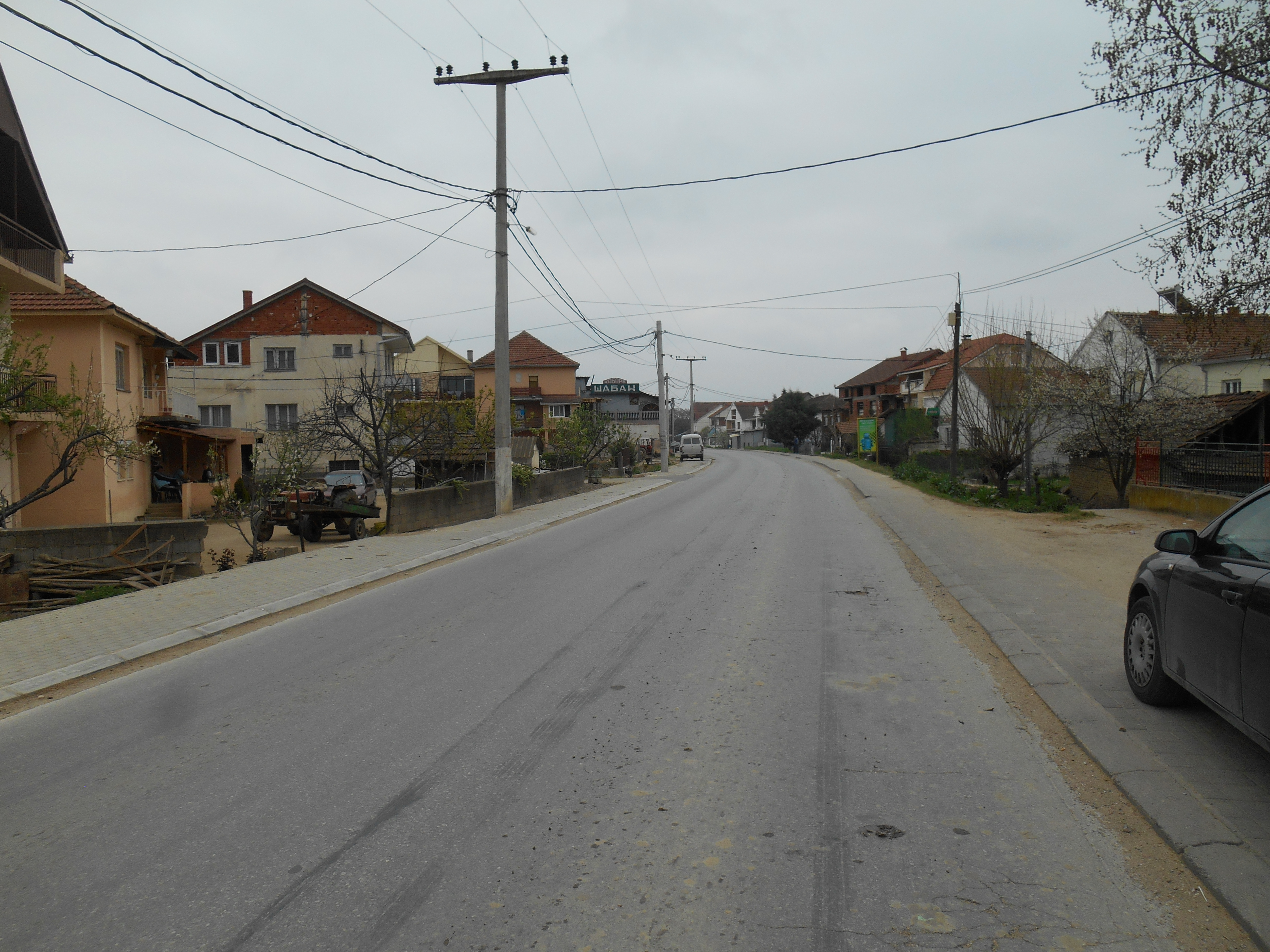 Дабиље, Општина Струмица